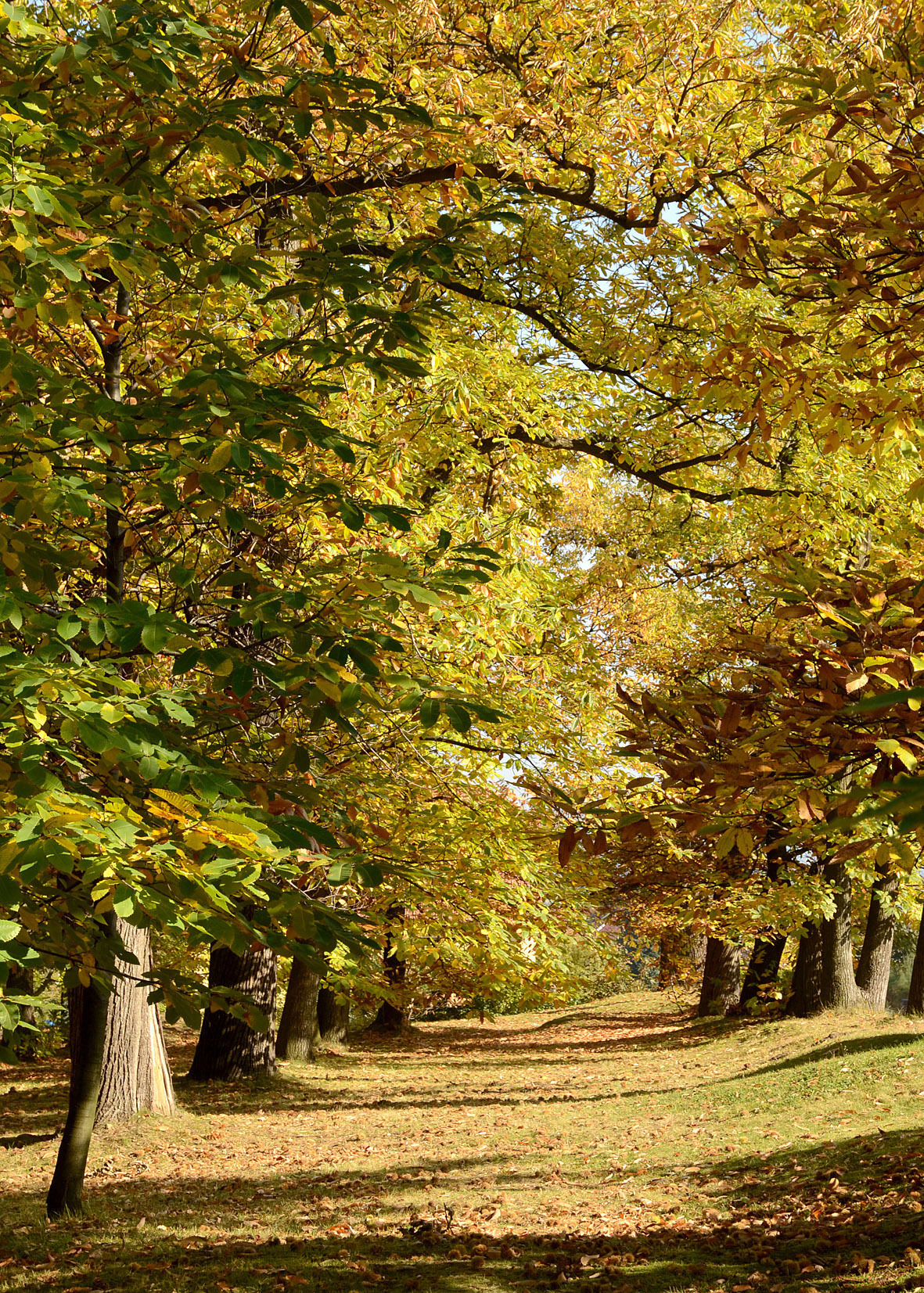 Kaštanka